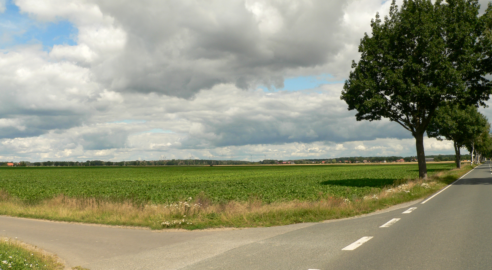 Linienbandkeramische Siedlung Niedernstöcken, Fortsetzung der Fundstelle auf einer Ackerfläche